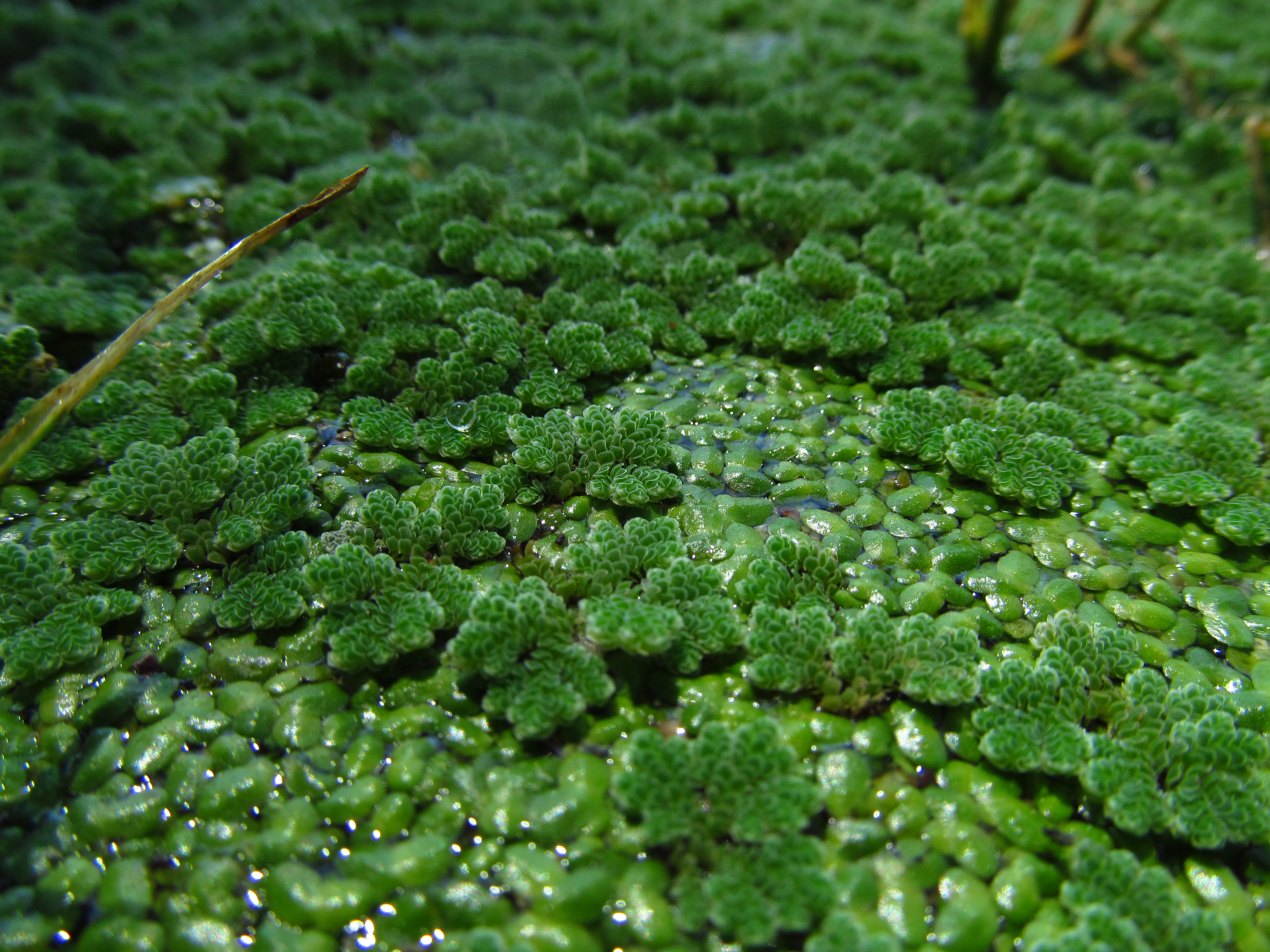 Srpski (latinica): vodena paprat (Azolla filiculoides)